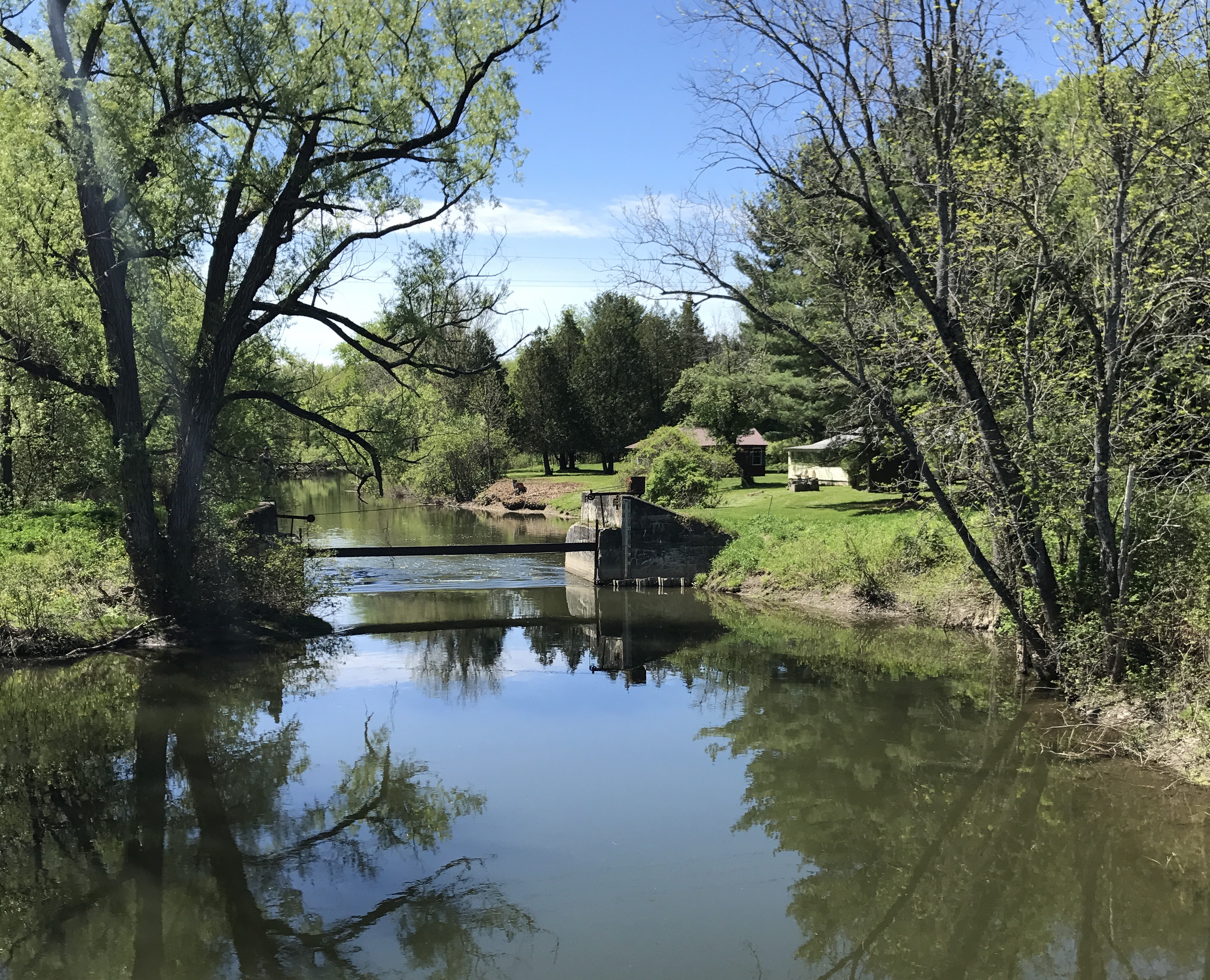 Oaks creek dam